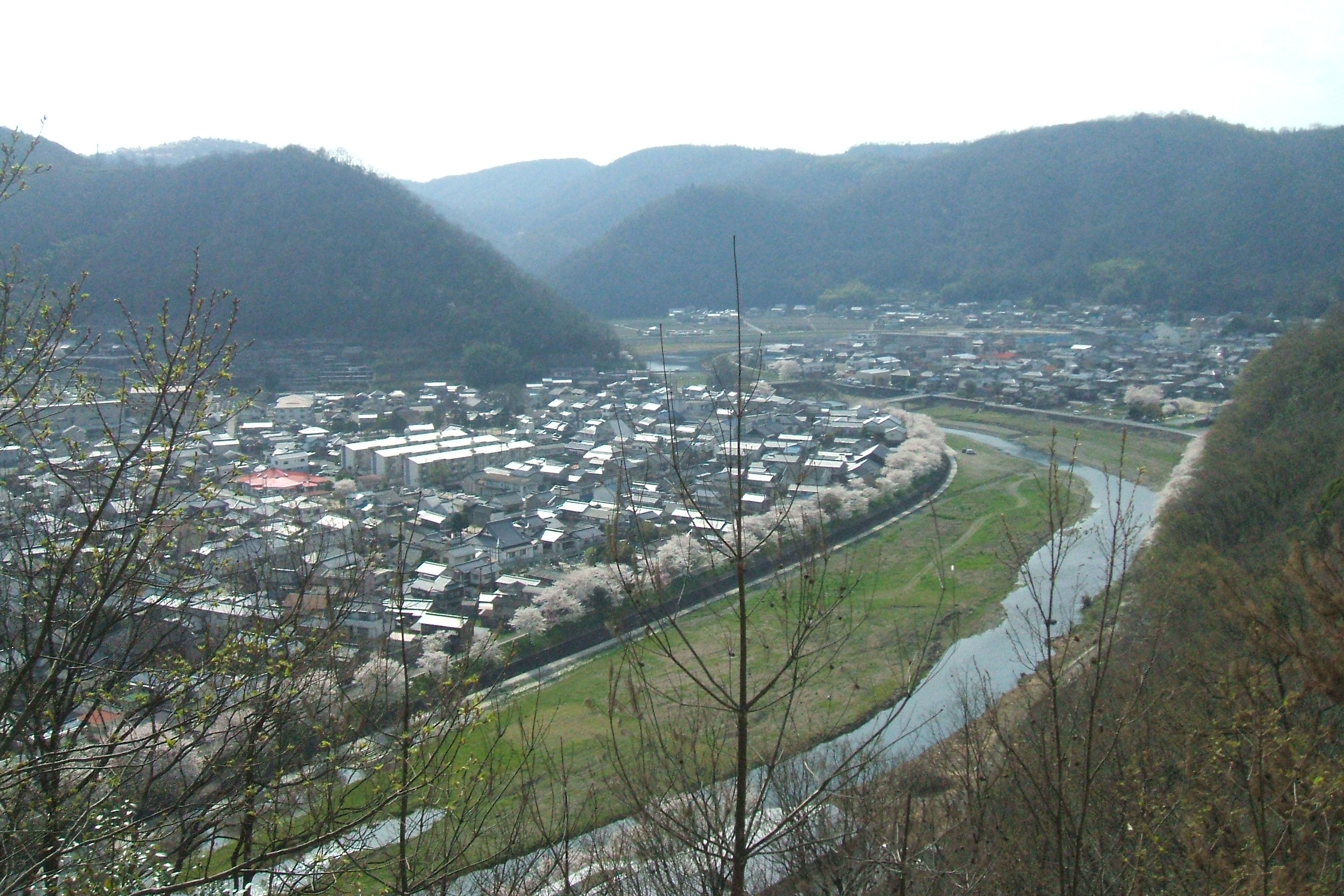 岡山県井原市の小田川河畔にある通称井原堤の桜並木